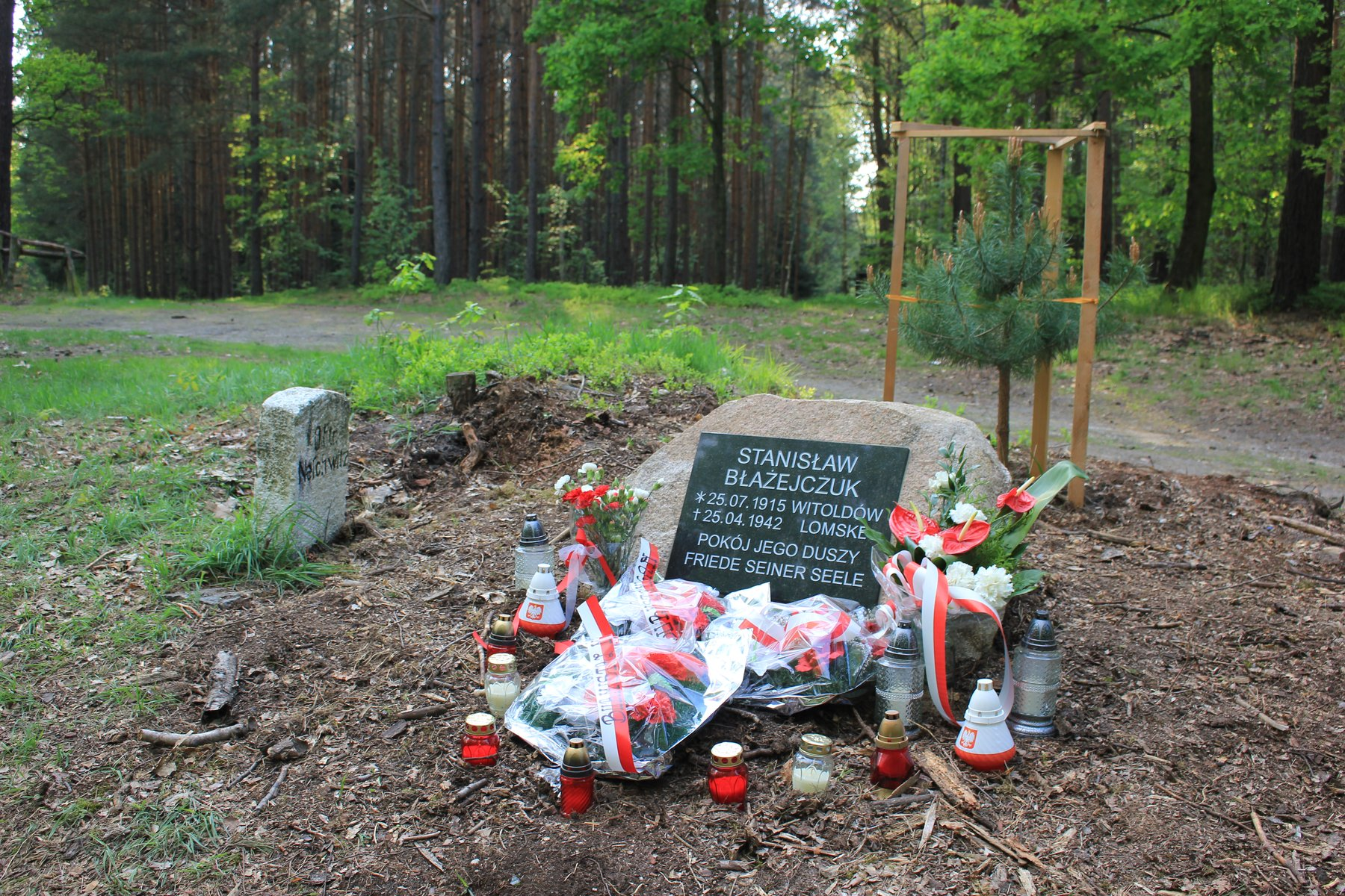 Hornjoserbsce: Pomnik za wot nacionalsocialistow zamordowaneho Stanisława Błażejczuka w lěsu pola Łomska.